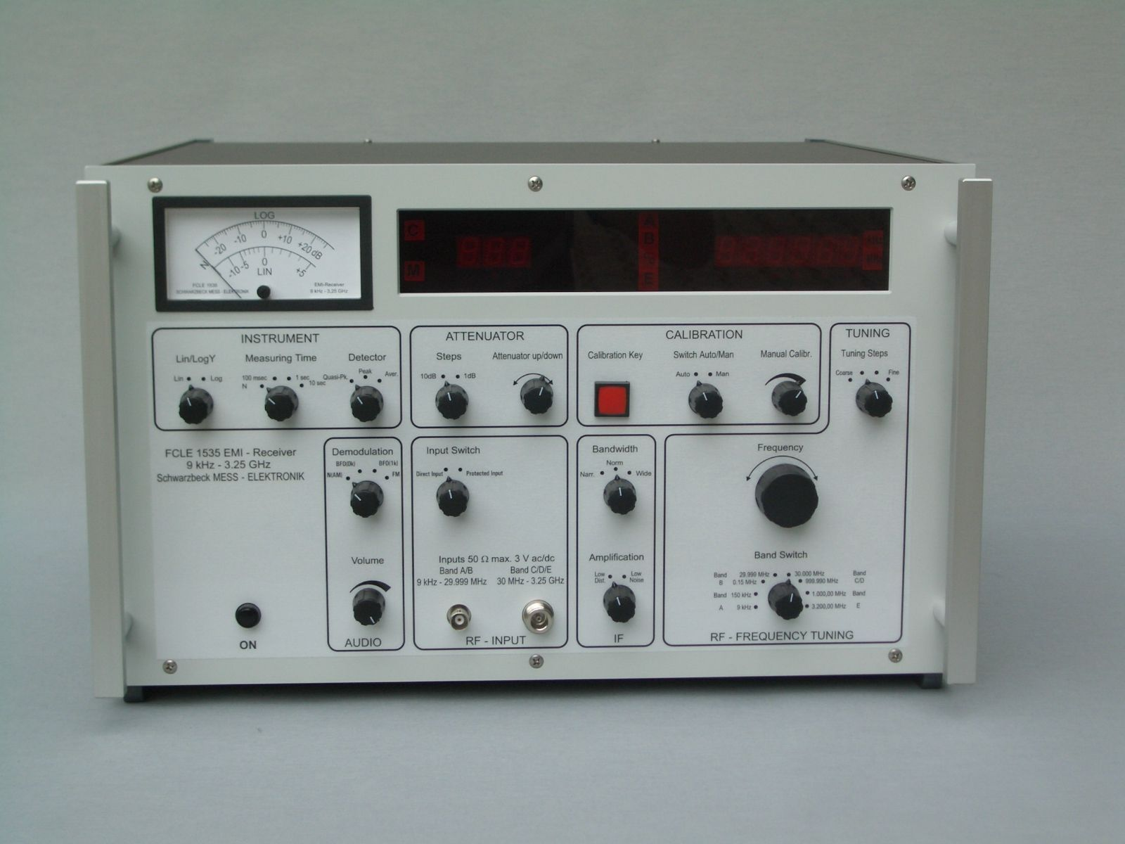 EMI-Receiver, 9kHz - 3.25GHz